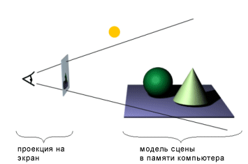 схема проекции в трёхмерной графике